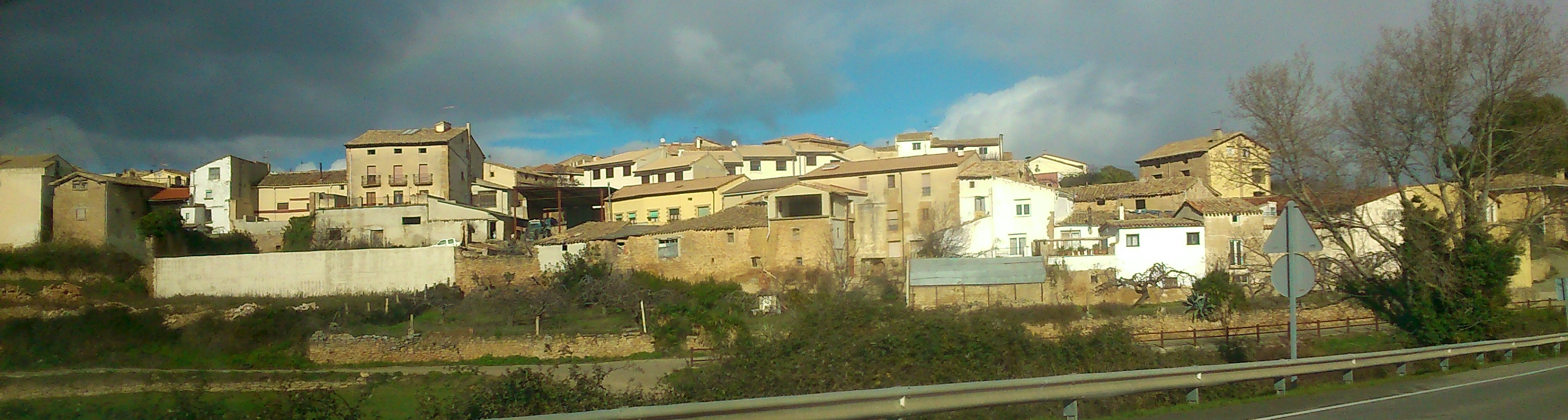 Morentin, Navarra